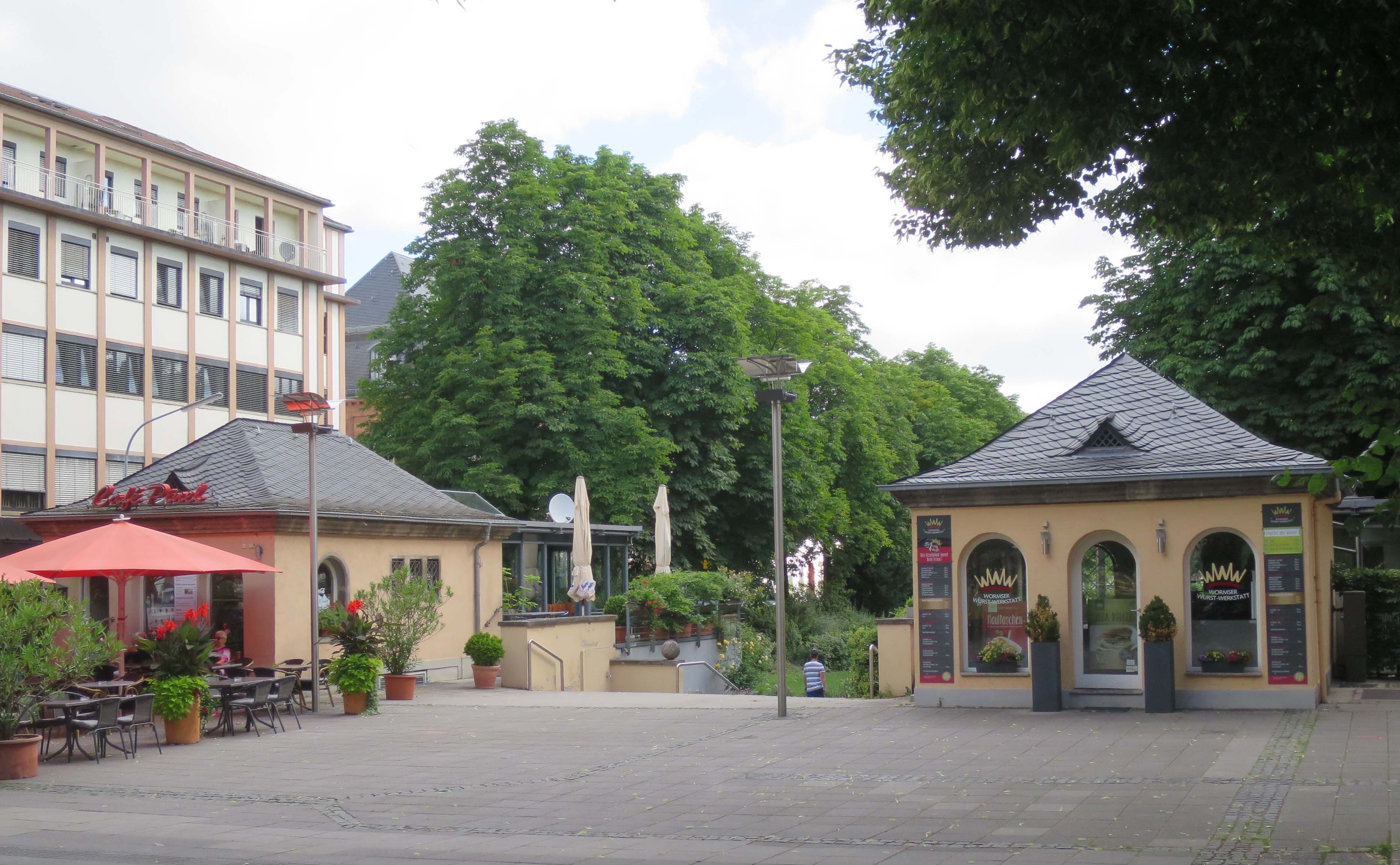 Worms, Wilhelm-Leuschner-Straße 2B